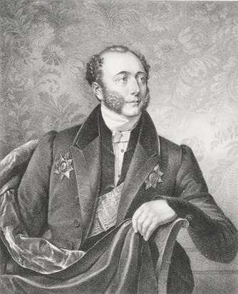 Князь Сергей Сергеевич Гагарин (1795—1852)